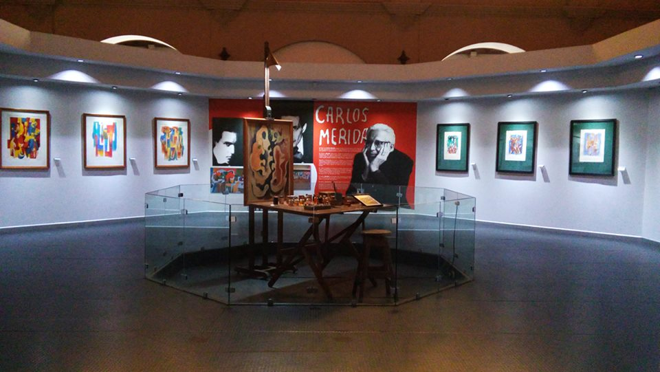 Vista de la sala Carlos Merida